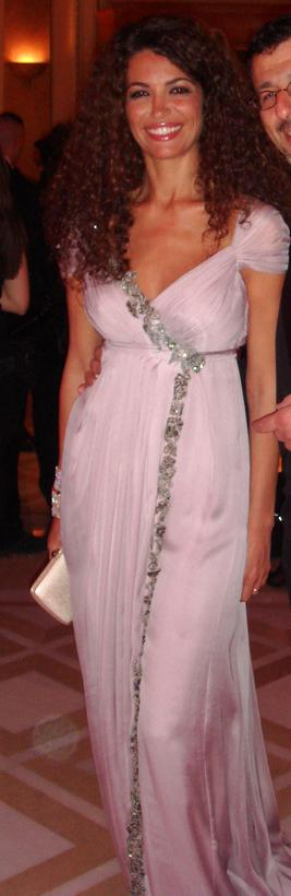 Afef Jnifen, porte-parole de Loréal